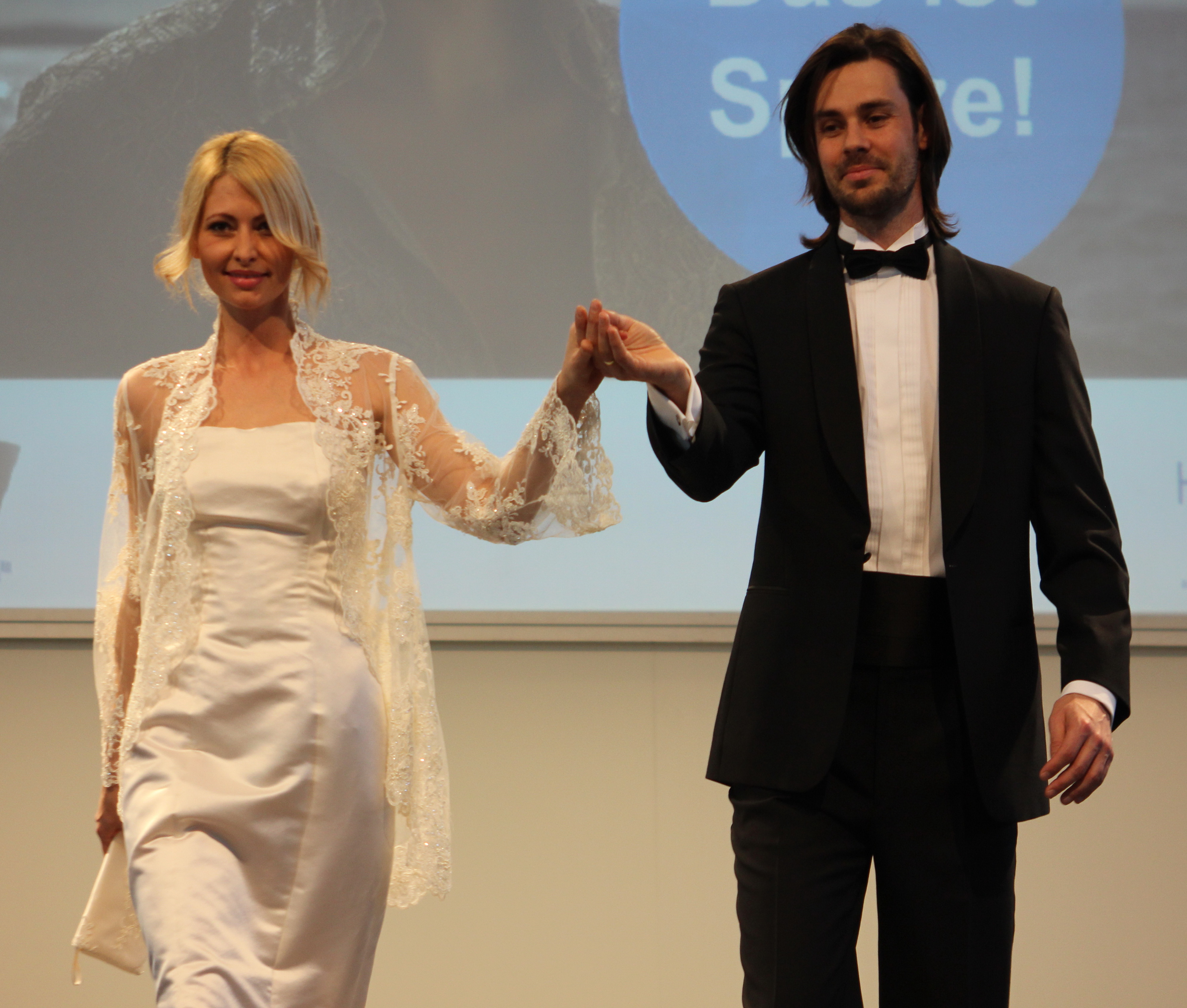 Modenschau auf der Internationalen Handwerksmesse in München 2014